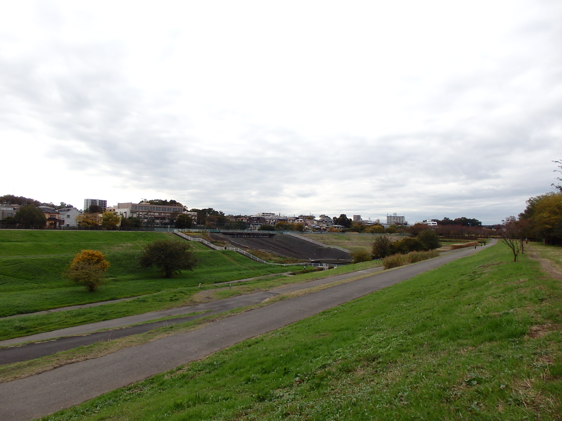 上谷沼調節池北側